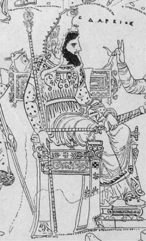 Original detail of Darius, with a label in Greek (ΔΑΡΕΙΟΣ, top right) giving his name, on the Darius Vase.Darío I, rey de los persas